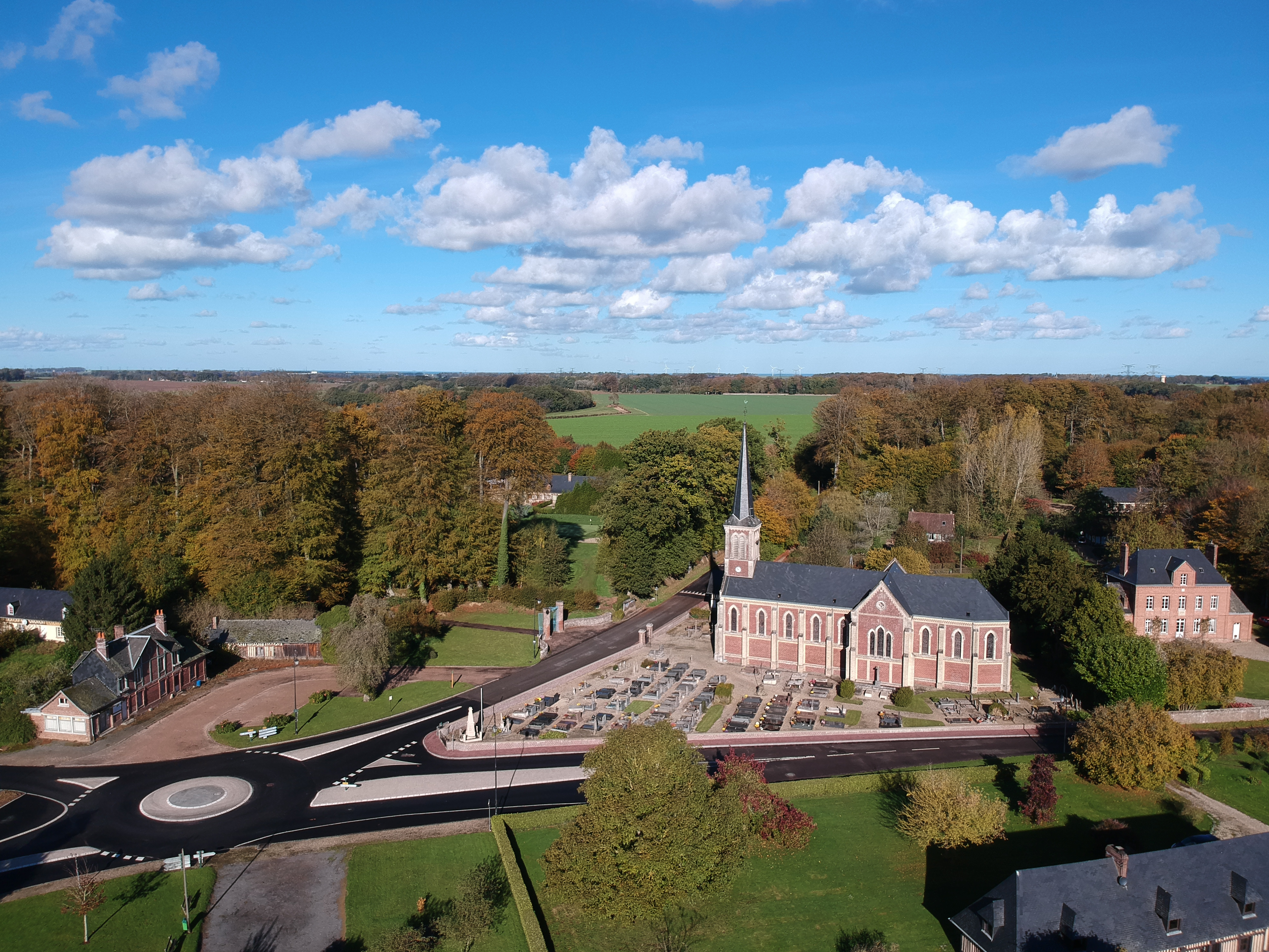 Photo du centre village prise avec un drone.